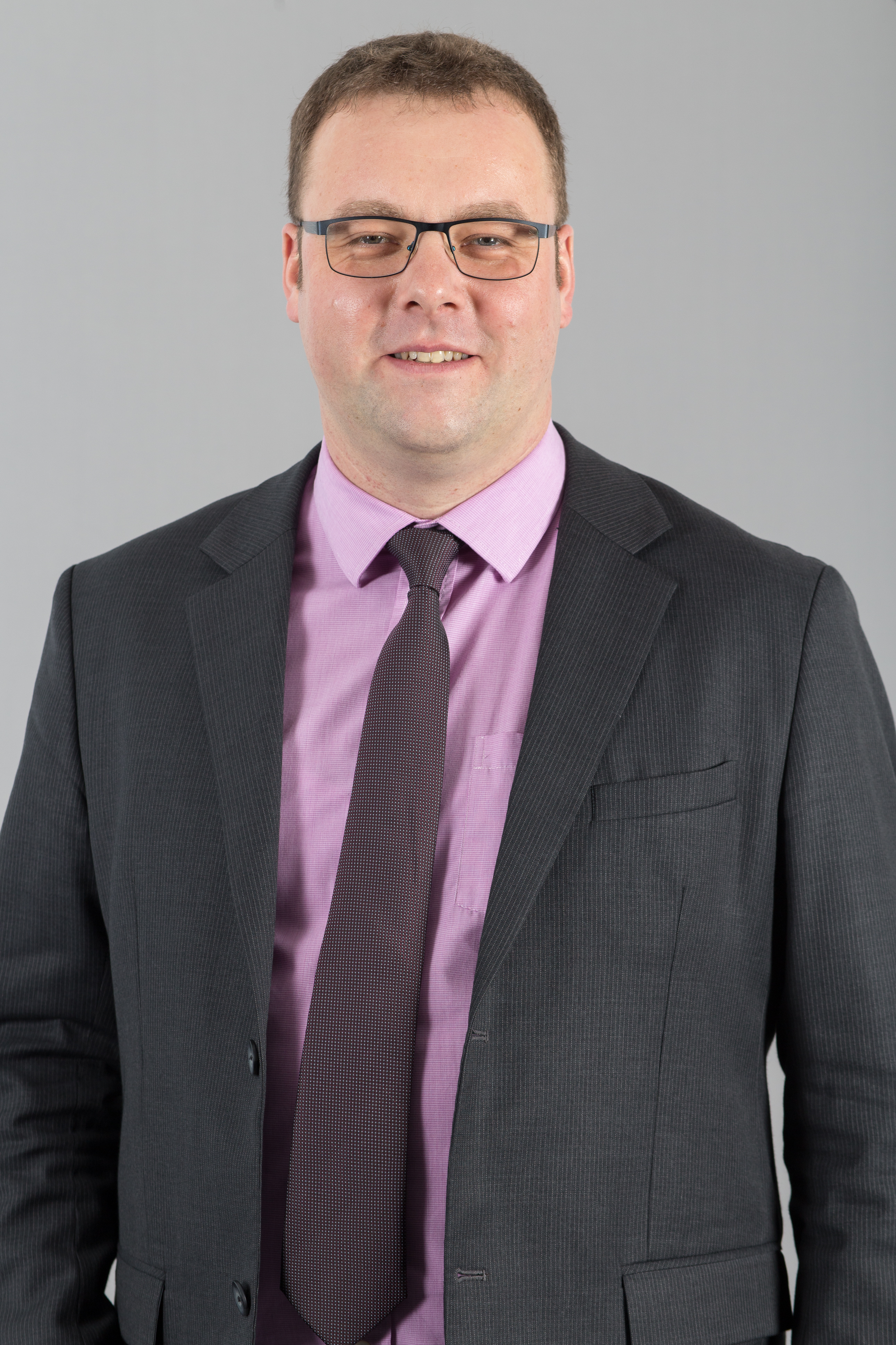 Marcus Malsch